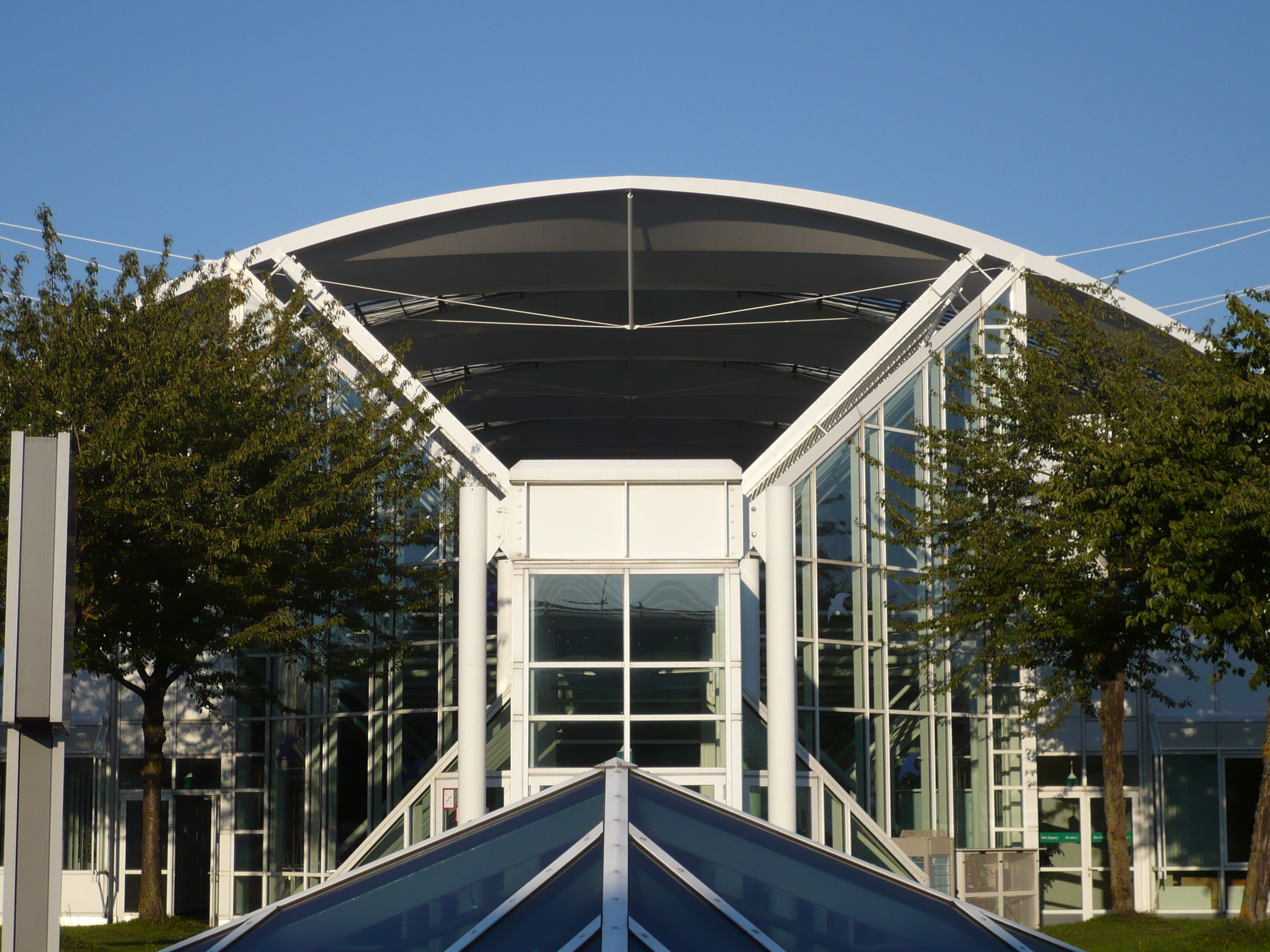 Zentralbereich des Flughafen Münchens